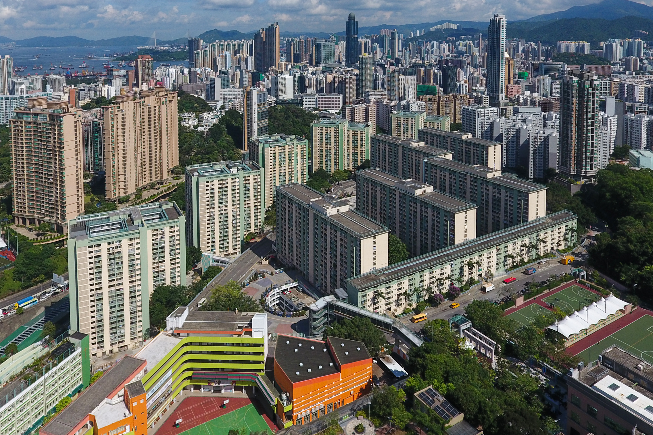 Oi Man Estate